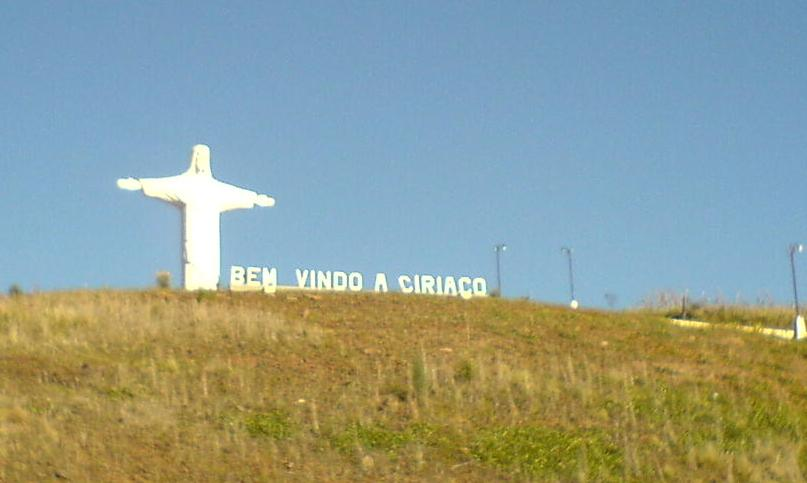 Cristo Redento de Ciríaco